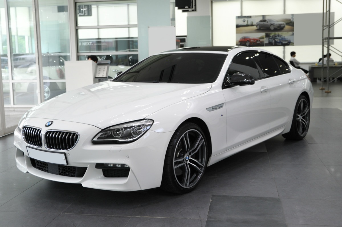 2018 BMW 6er Gran Coupe M Sport, F06